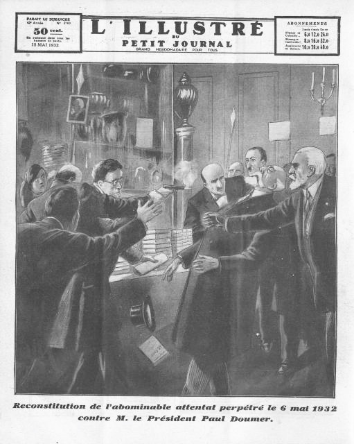 Reconstitution de l'assassinat du président Paul Doumer (6 mai 1932).